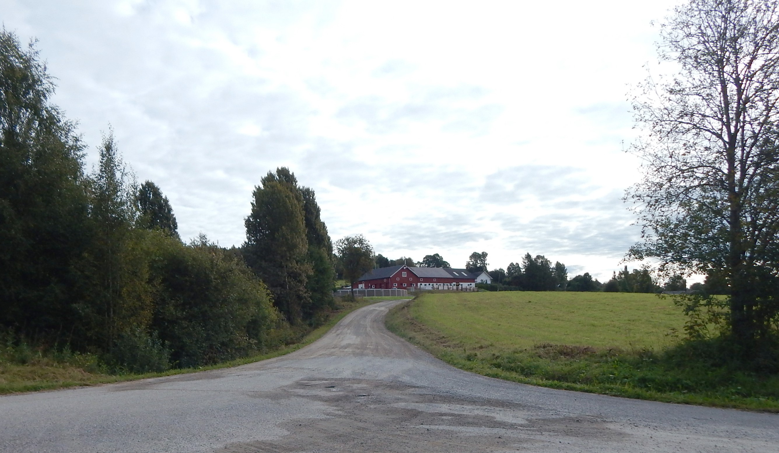 Tåsåsvegen (fylkesvei 1732, tidl. 61) øst for Brumunddal